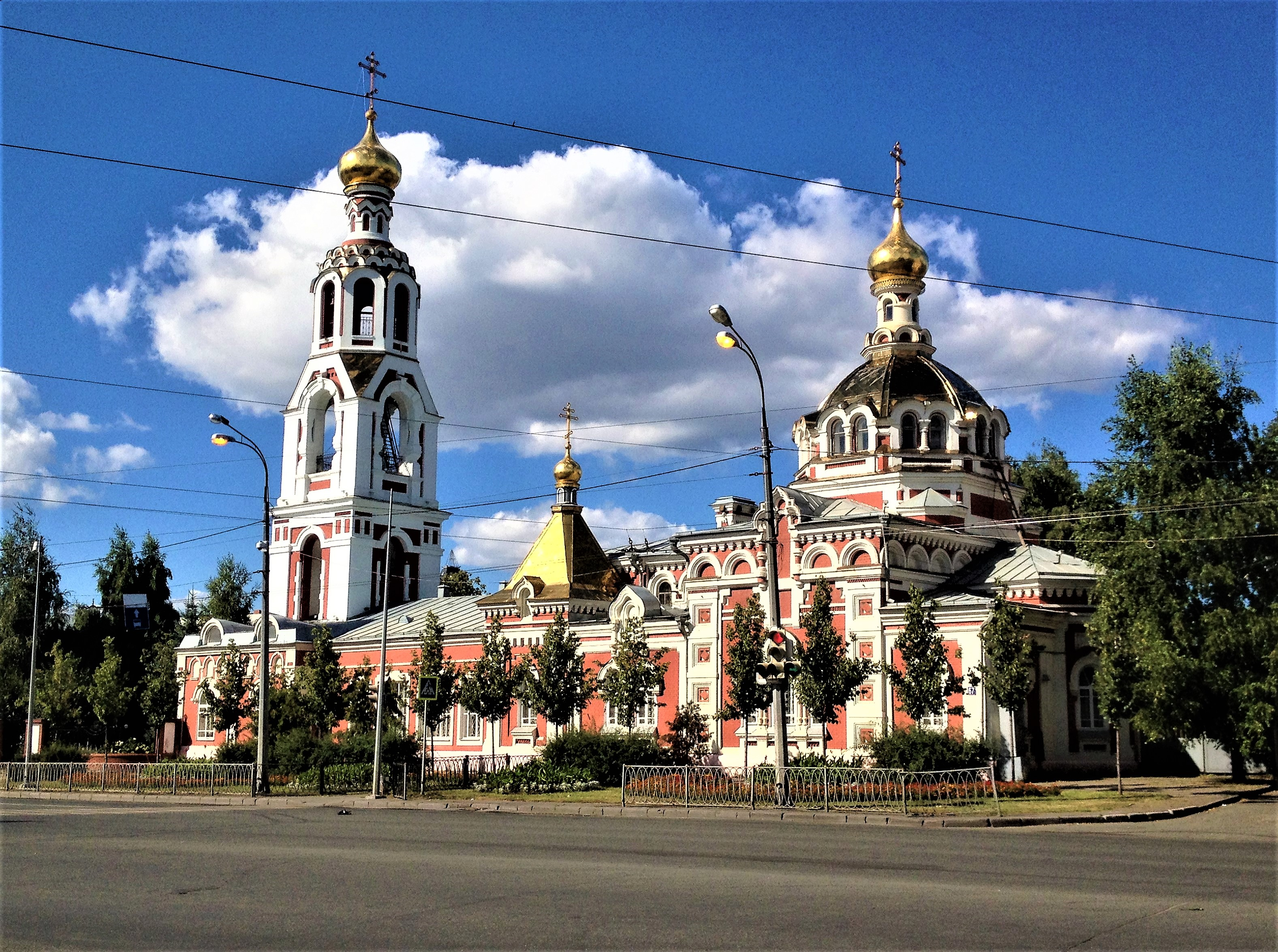 Церковь Святой Варвары: улица Карла Маркса, 67, Казань, Татарстан